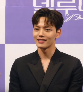 8일 오후 서울시 강남구 논현동 임피리얼 팰리스 서울에서 tvN 새 토일 드라마 ‘호텔 델루나’ 제작발표회가 열려 여진구가 드라마를 선택한 이유에 대해 설명하고 있다.